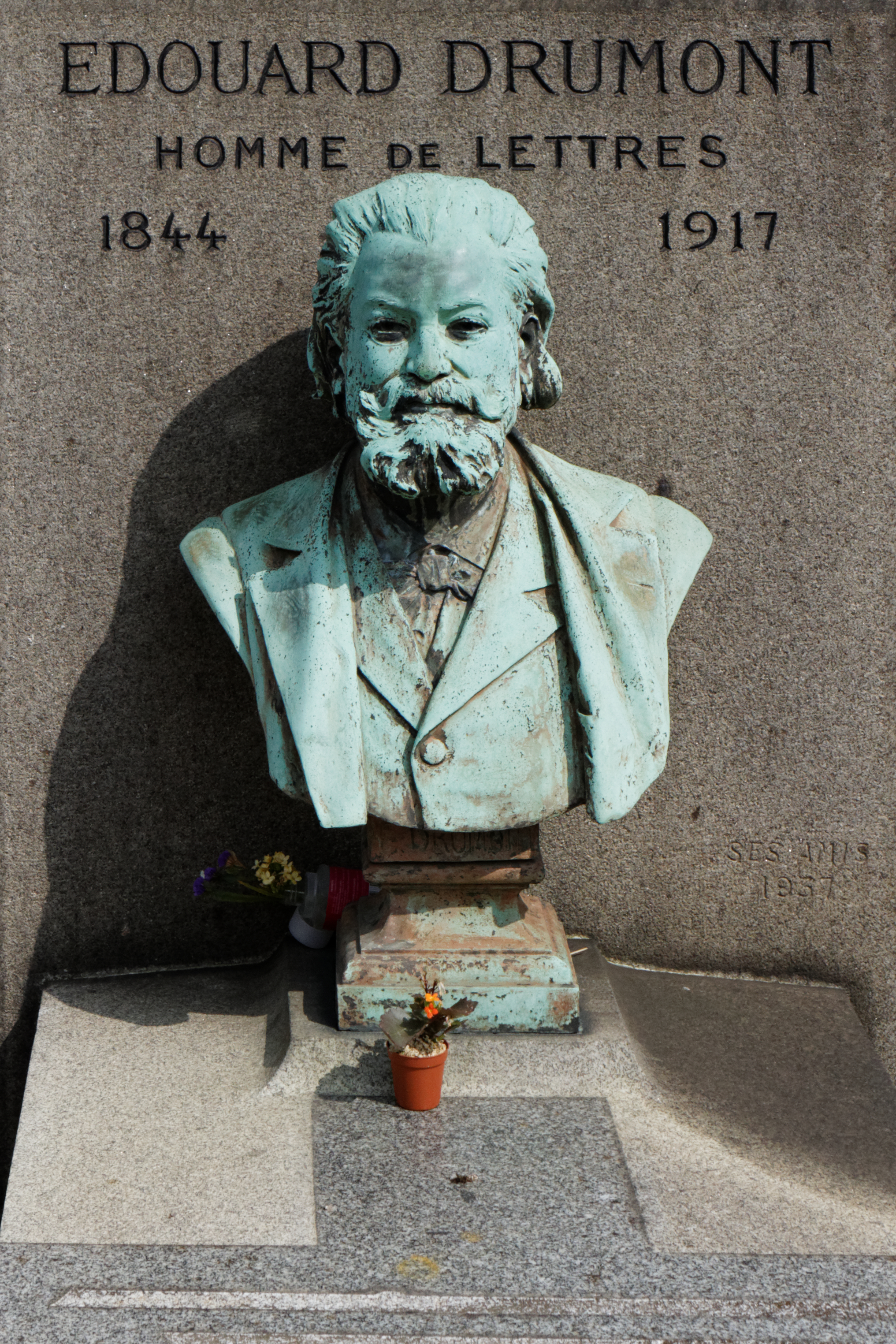 Sépulture d'Édouard Drumont (1844-1917).